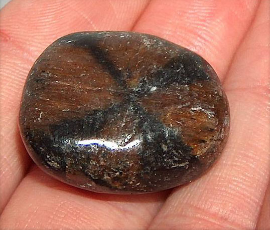 chiastolit /andaluzyt/, grudka polerowana; autor zdjęcia Grzegorz Framski